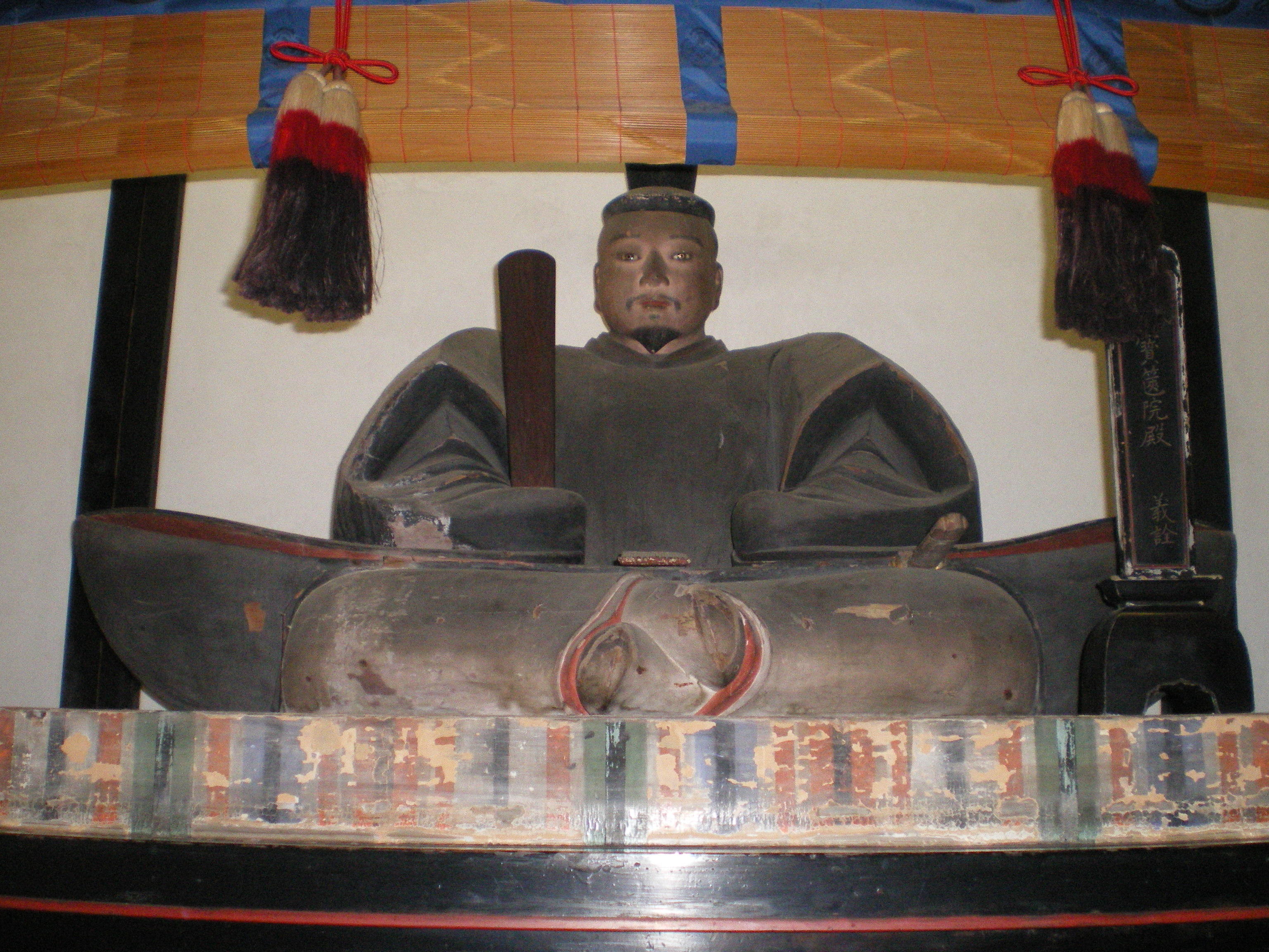 足利義詮木像（等持院）